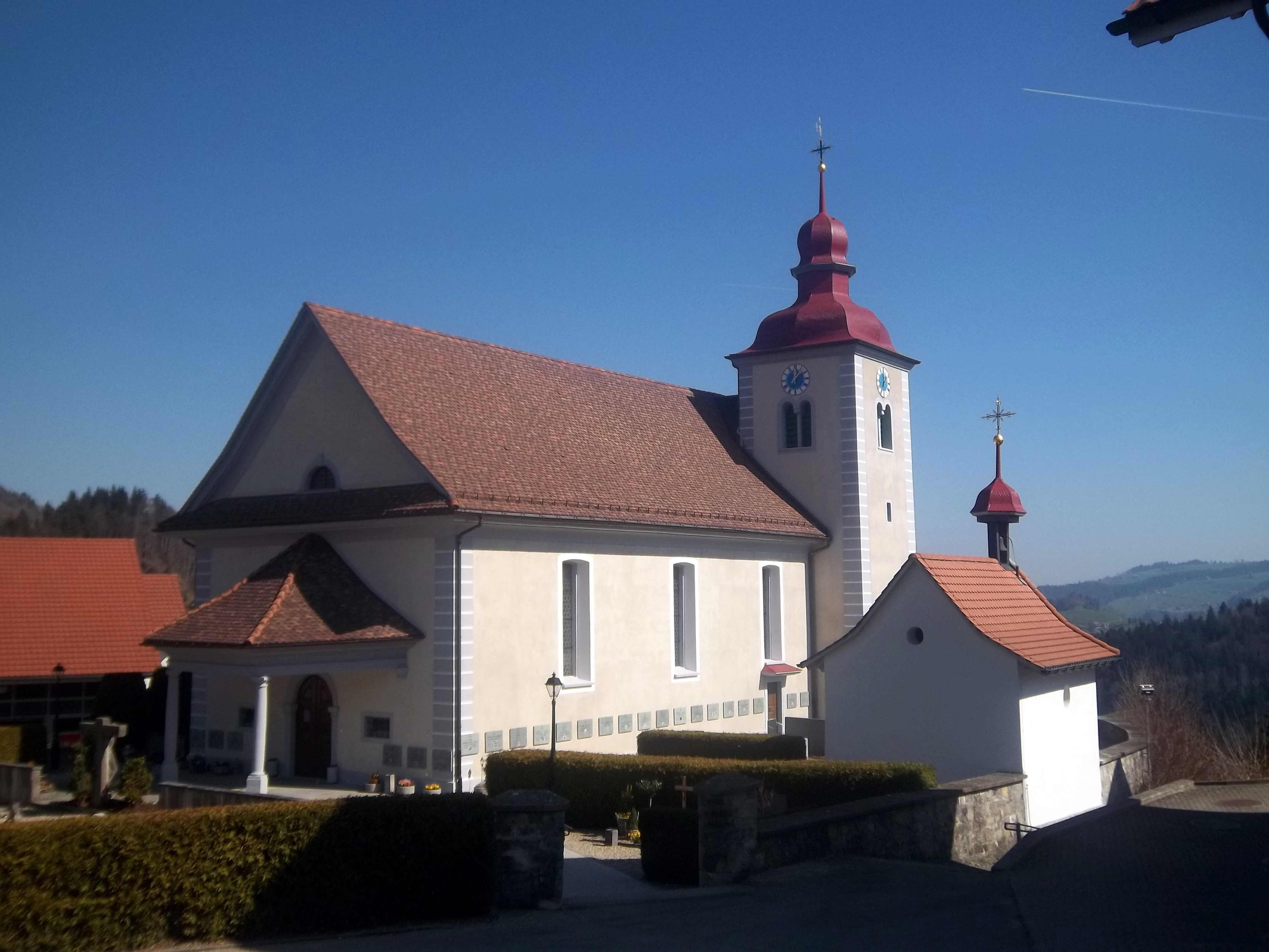 Iglesia de la comuna de Romoos, en el Cantón de Lucerna (Suiza).